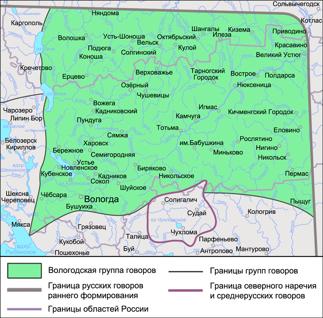 Карта Вологодской группы говоров. Источники: Захарова К. Ф., Орлова В. Г. Диалектное членение русского языка — 2-е изд. — М.: Едиториал УРСС, 2004. — ISBN 5-354-00917-0, приложение: Диалектологическая карта русского языка (1964 г.). Касаткин Л. Л. Русские диалекты. Лингвистическая география Русские. Монография Института этнологии и антропологии РАН — М.: Наука, 1999, с. 94. Территориально-диалектное членение русского языка. Федеральная целевая программа Русский язык. Региональный центр НИТ ПетрГУ